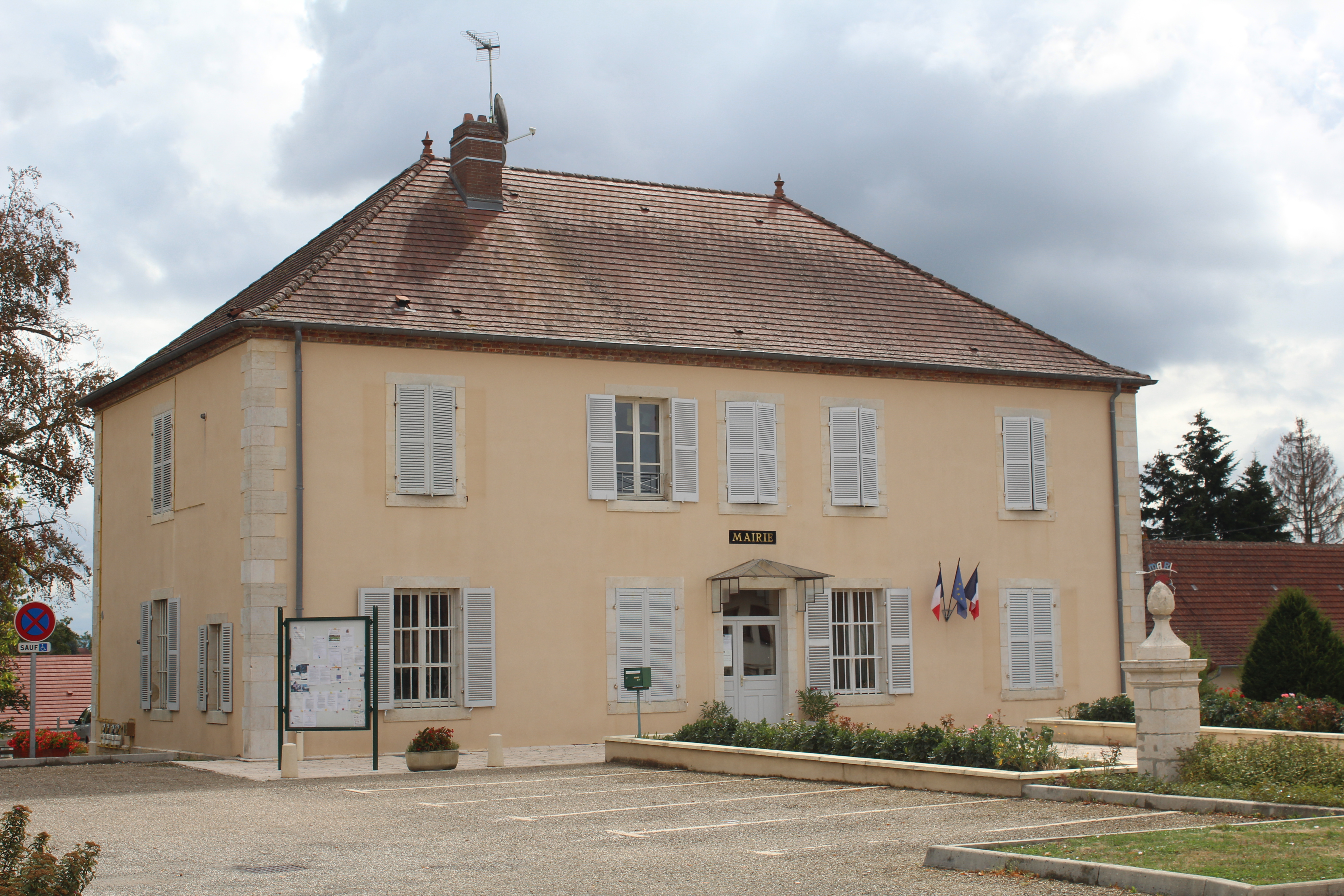 Mairie des Essards-Taignevaux.